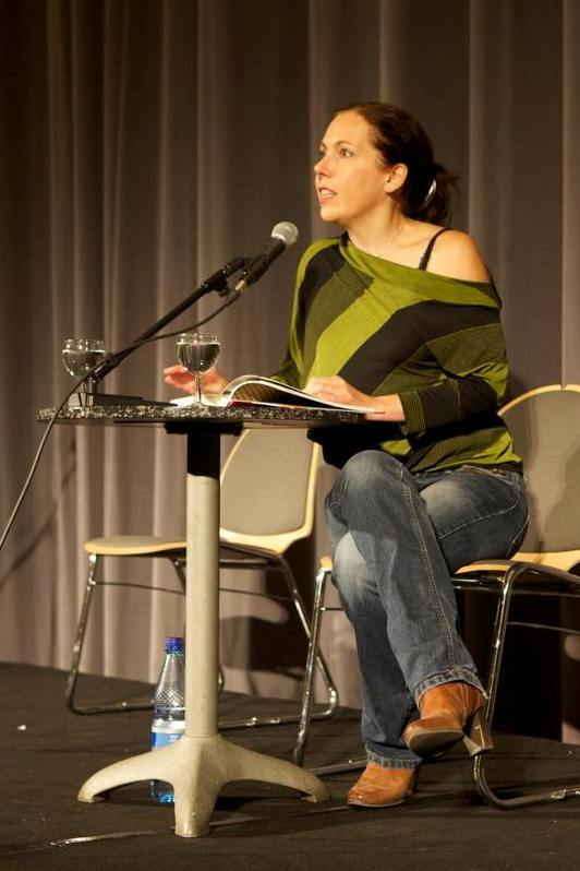 Christiane Neudecker liest im Babylon/Berlin 2013